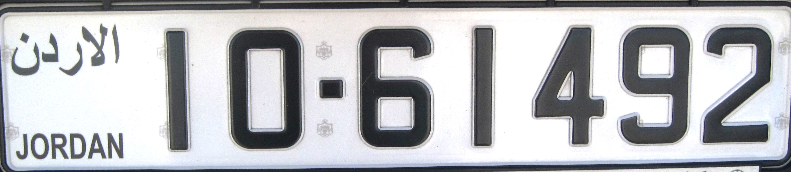 kentekenplaat Jordanië 3